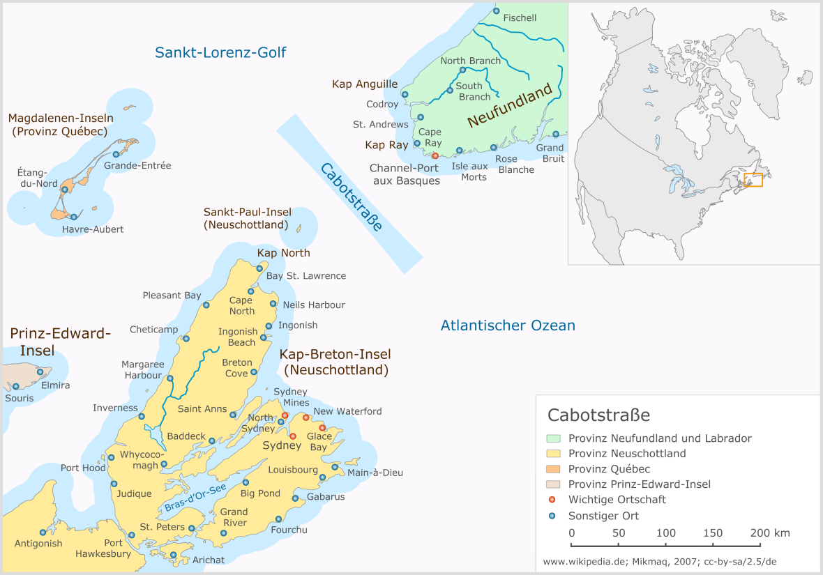 Cabotstraße